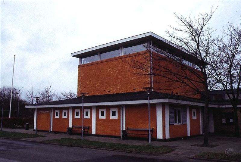 Tingbjerg Kirke i Danmark. Tingbjerg kirke